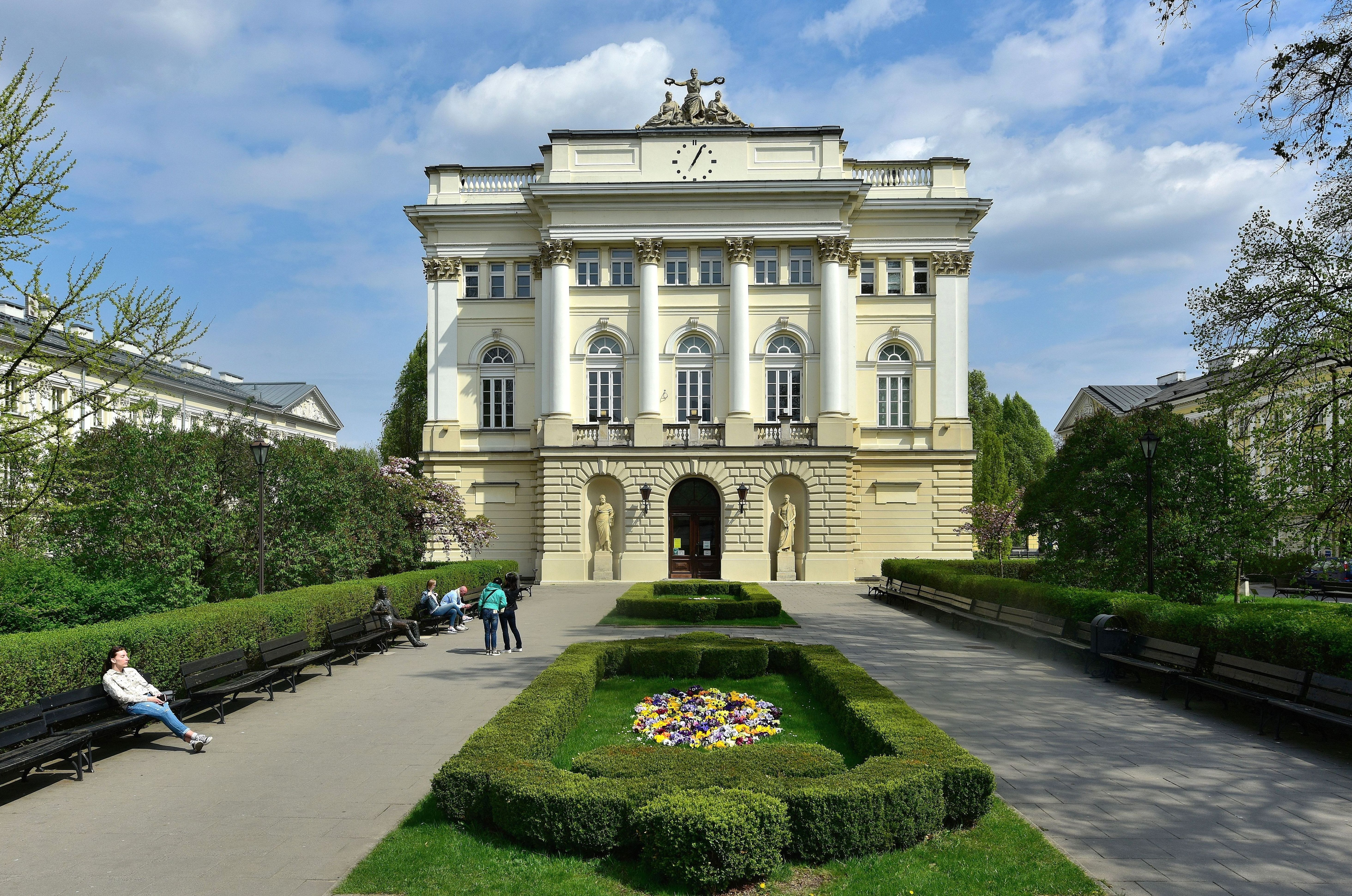 Dawny budynek BUW, kampus centralny UW w Warszawie